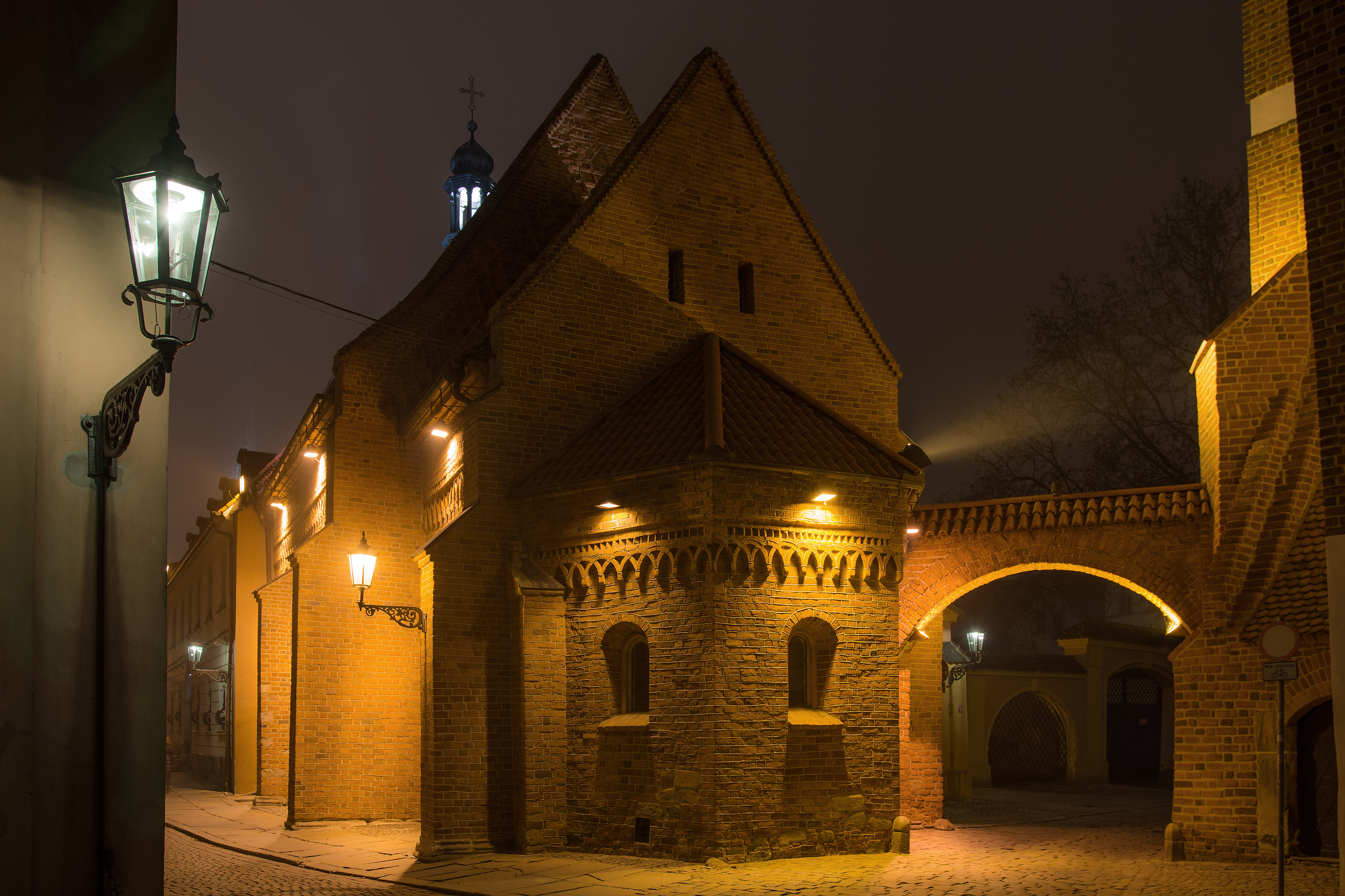 Wrocław, kościół p.w. św. Idziego, 1 poł. XIII, po 1953